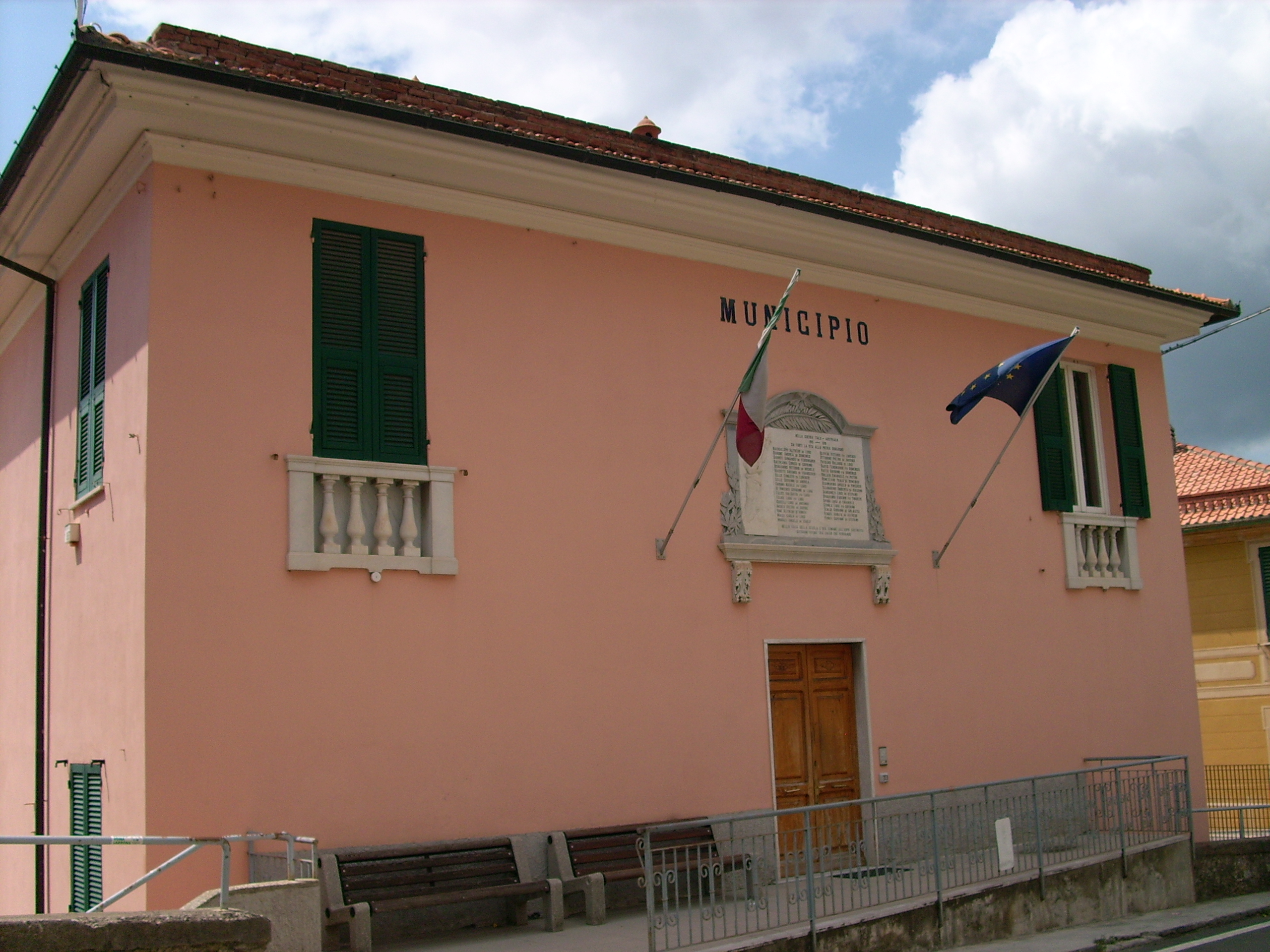 Municipio di Castiglione Chiavarese, Liguria, Italia